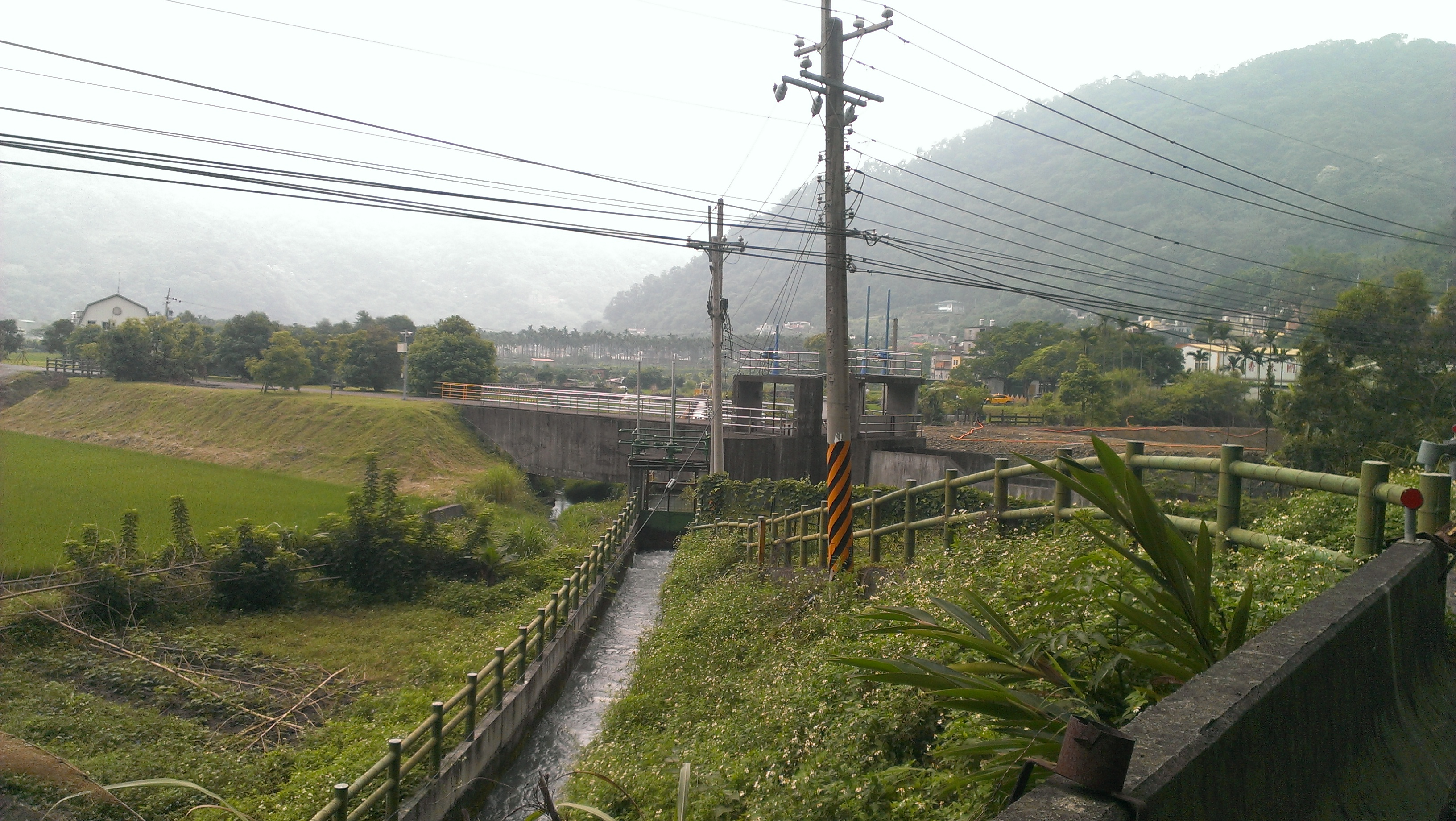 竹東圳之水道二